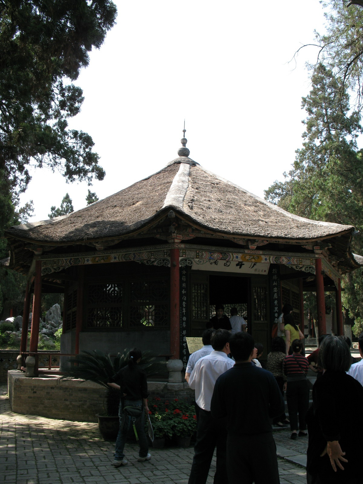 Nanyang Memorial Temple to Wuhou 河南南阳武侯祠